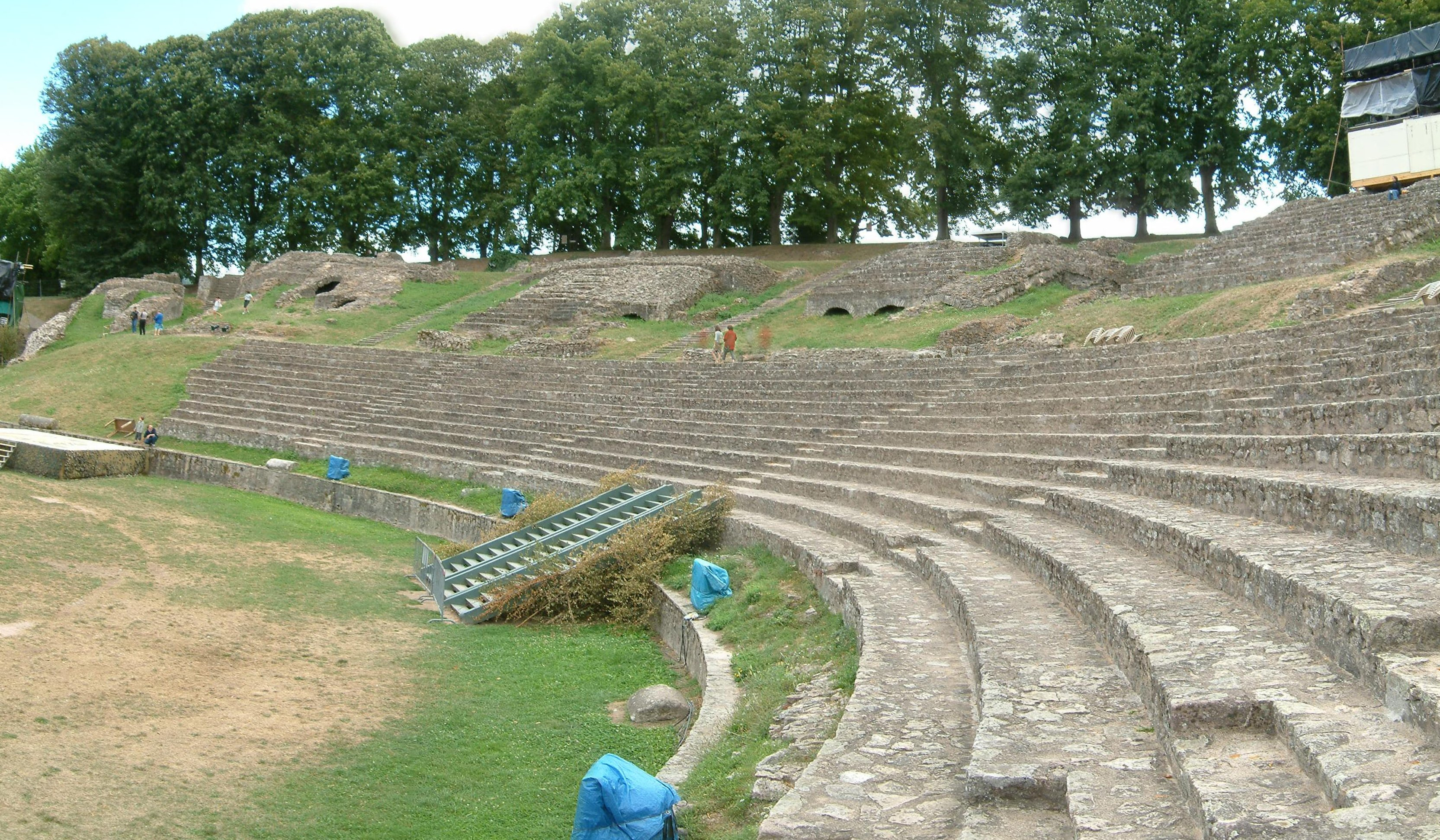 Autun, théâtre gallo-romain, Bourgogne, FRANCE